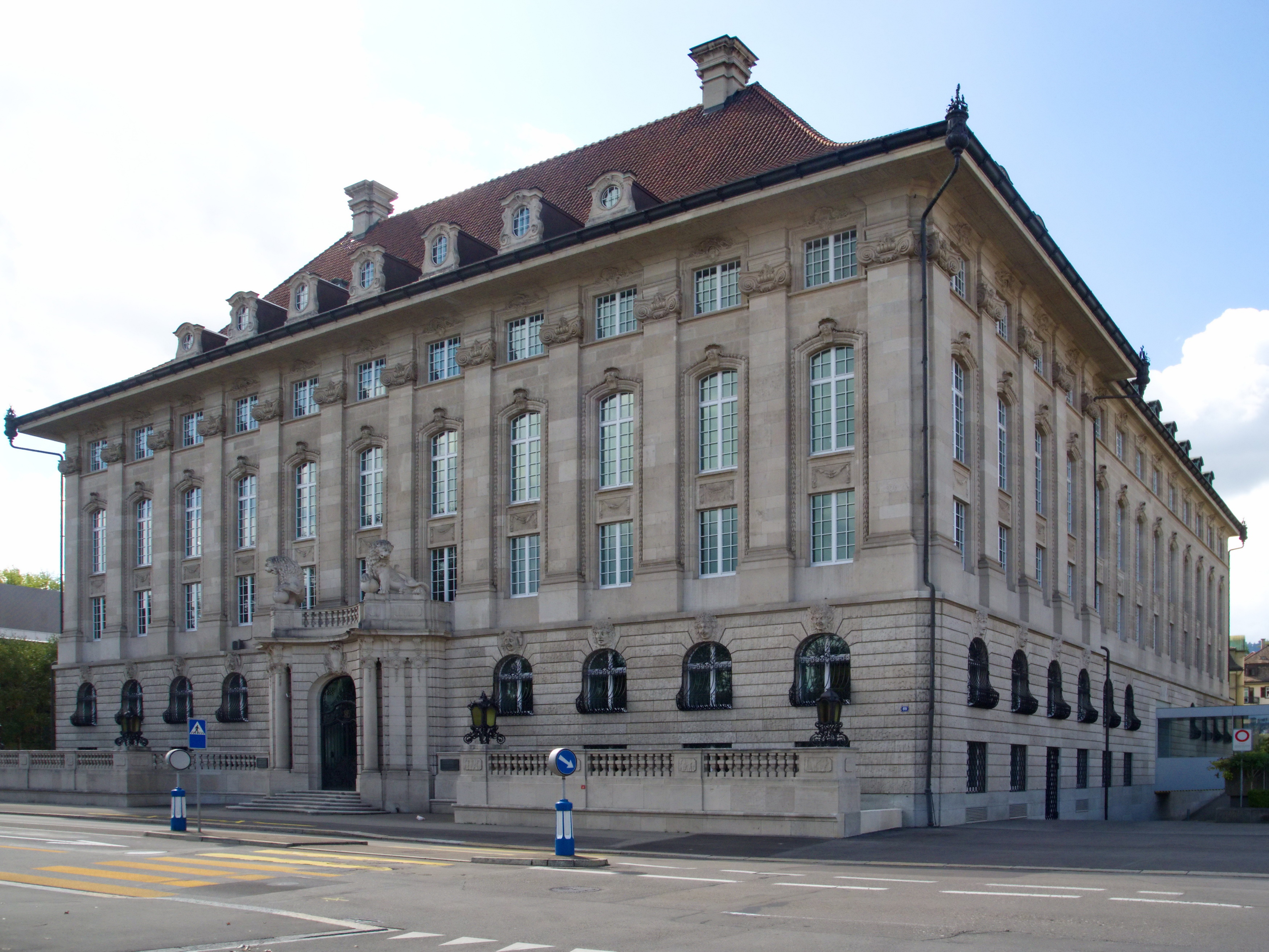 Firmenarchiv der Swiss Re